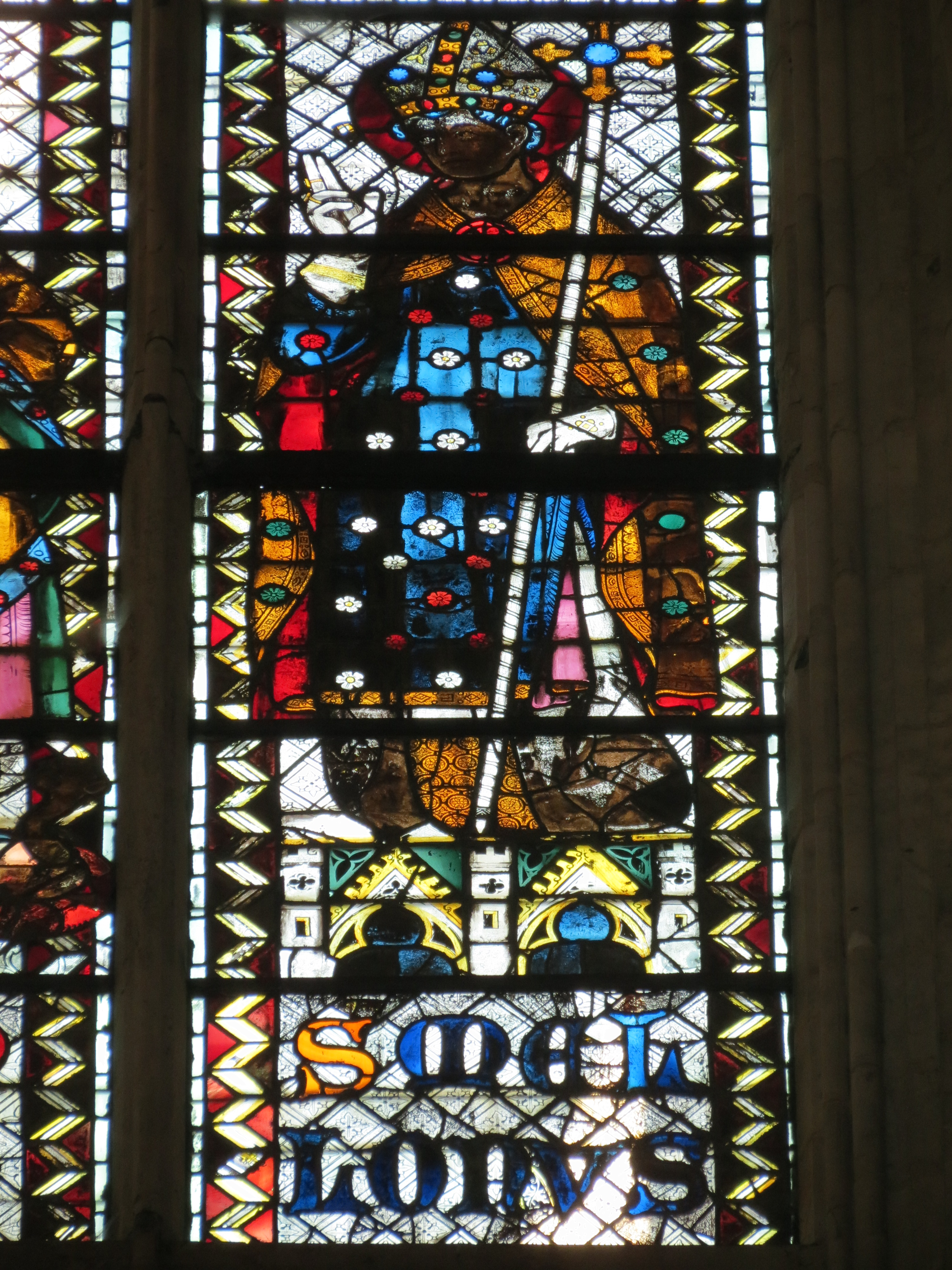 Détail de la baie du chœur 208 de Saint-Ouen de Rouen représentant Saint-Mellon, premier évêque de Rouen.